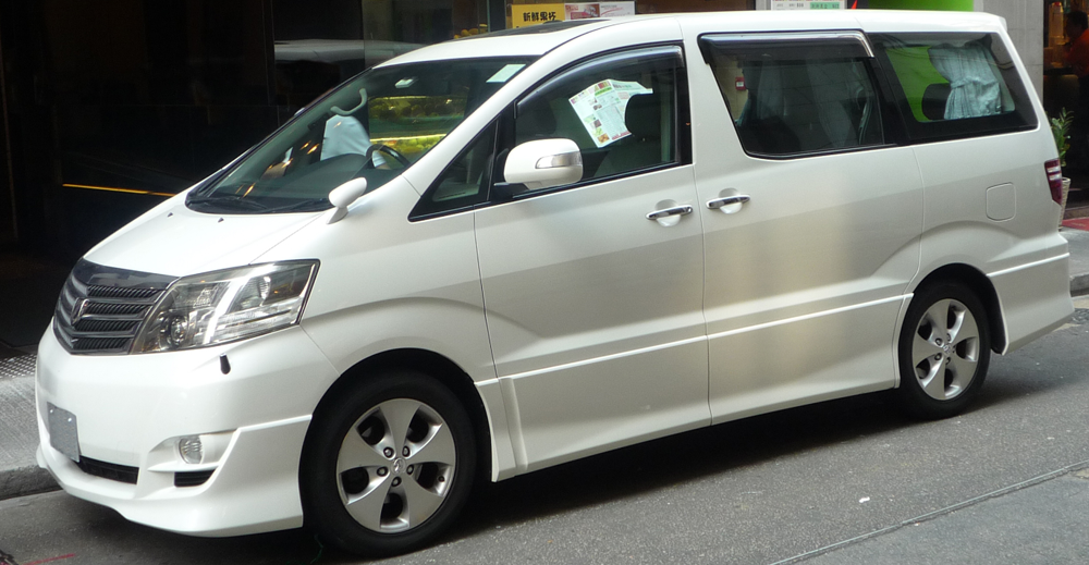 document destiné à illustrer l'article sur le Toyota Alphard